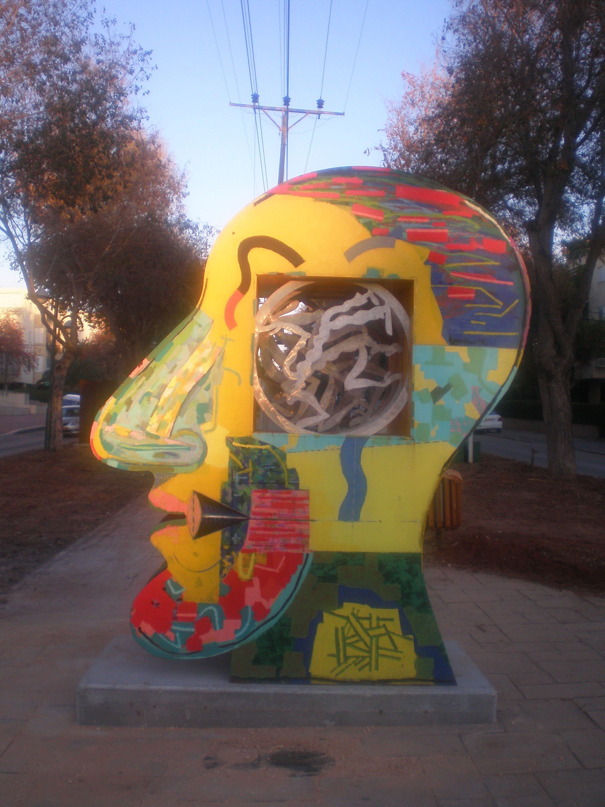 a sculpture in Sculpture garden, Ramat Hasharon, Israel